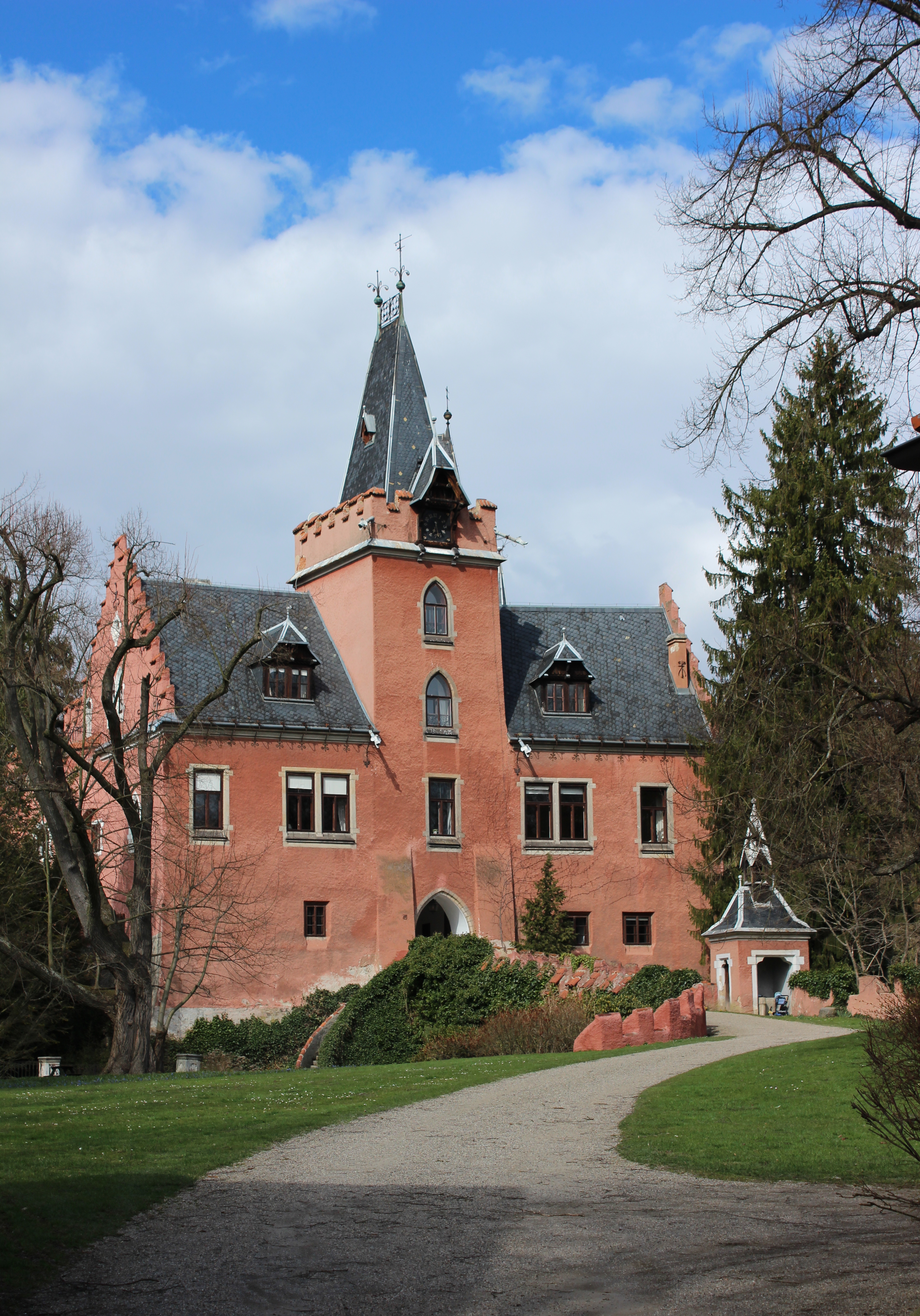 Červený Hrádek – zámek na východě města Sedlčany. Okres Příbram. Česká republika.